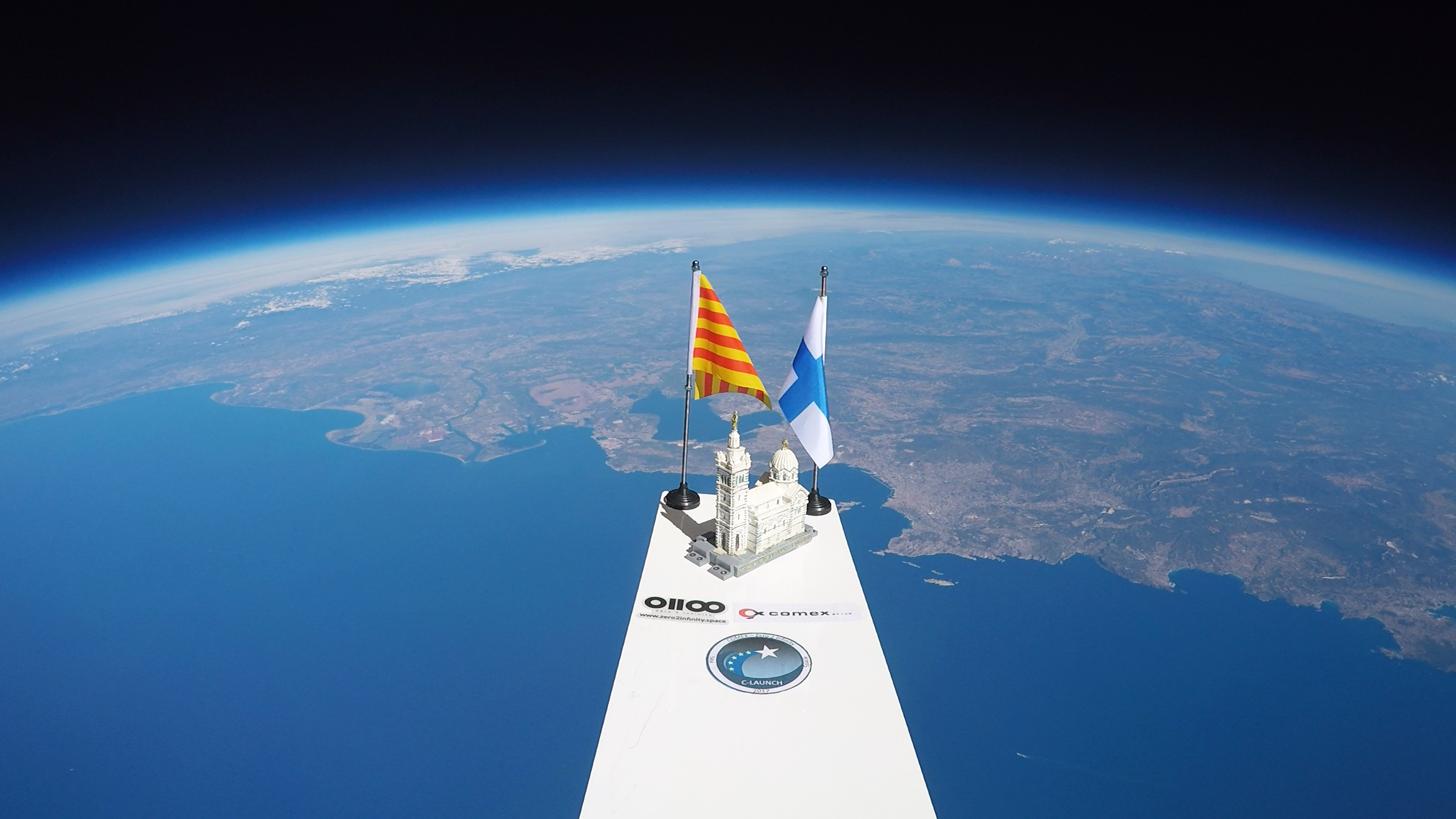 Un modele de Notre Dame de la Garde envoyé en stratosphere (20km altitude) par la COMEX et ZERO2INFINITY dans le cadre de la mission "C-LAUNCH" en 2017.